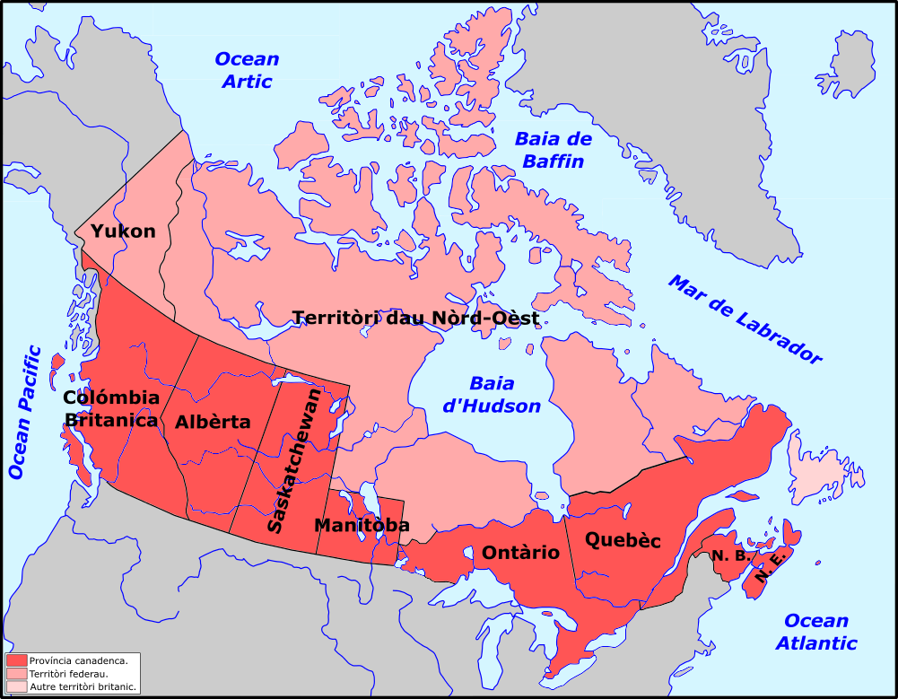 Territòri canadenc en 1905.